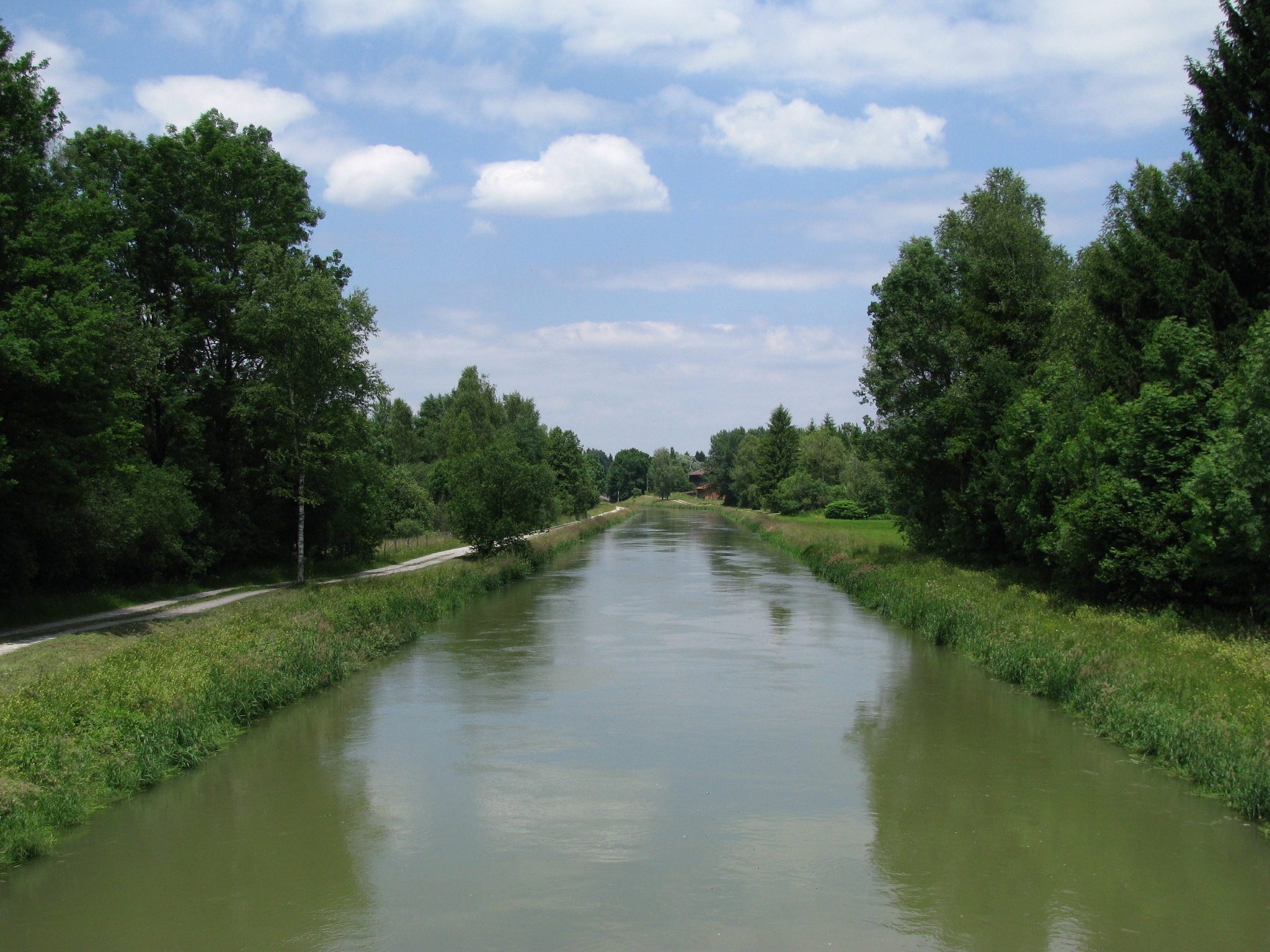 Der Loisach-Isar-Kanal zwischen Herrnhausen und Gelting nähe der Ortschaft Ziegelei. Blickrichtung nach Norden.